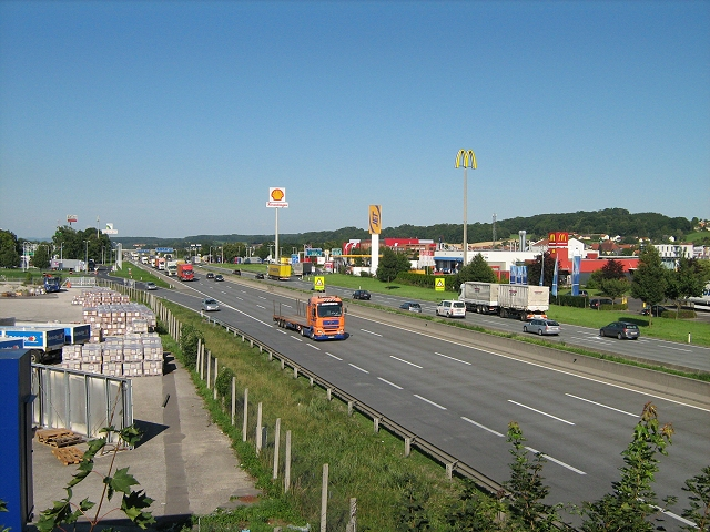 Westautobahn Highway at Ansfelden